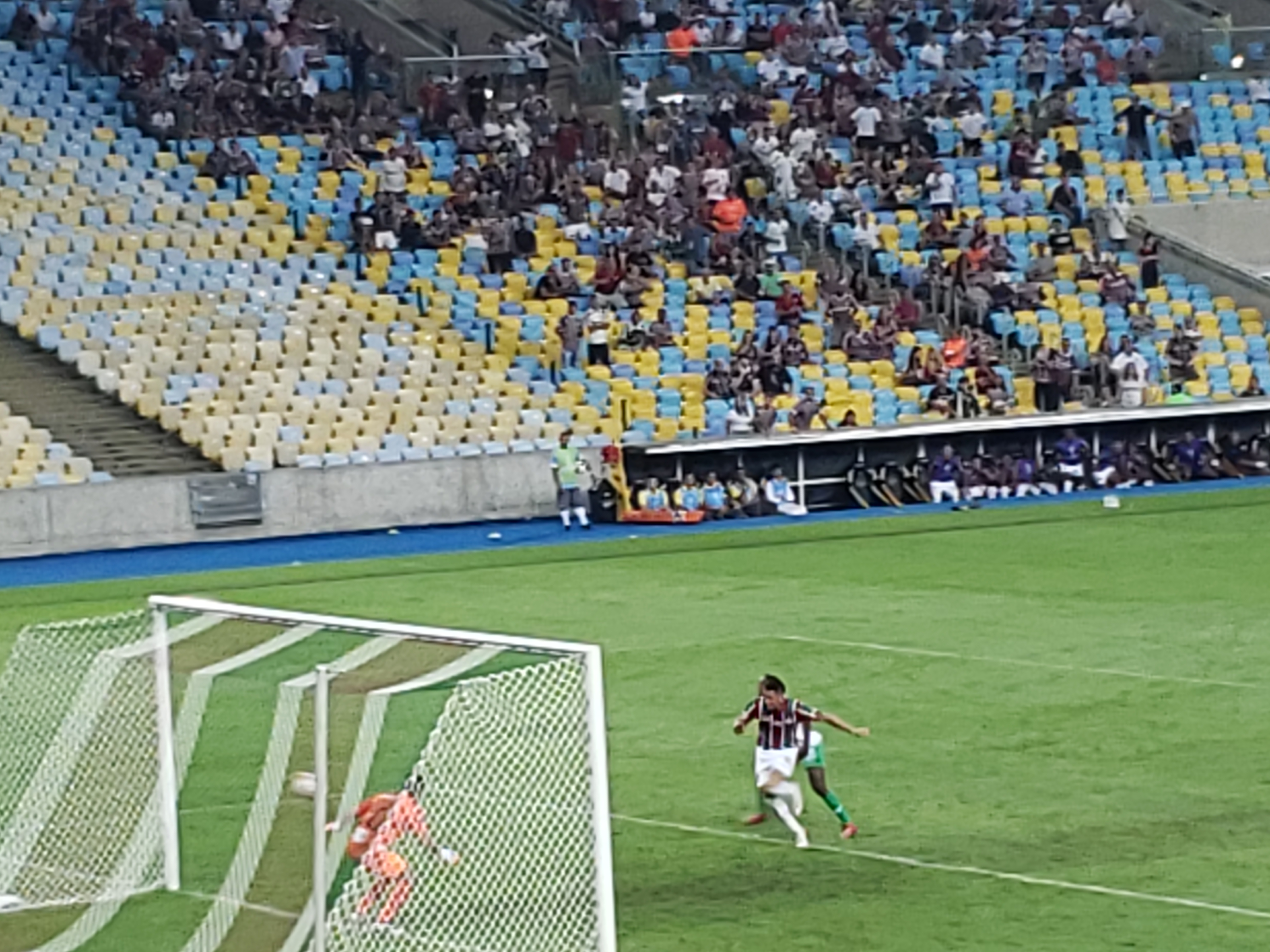 Fluminense 4–1 Atlético Nacional, 23 de maio de 2019. Copa Sul-Americana, Maracanã.